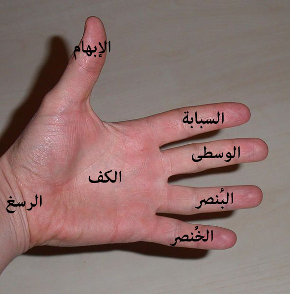 Originally uploaded to french wikipedia by user:Marc Mongenet, le 19 octobre 2004. Paume d'une main gauche